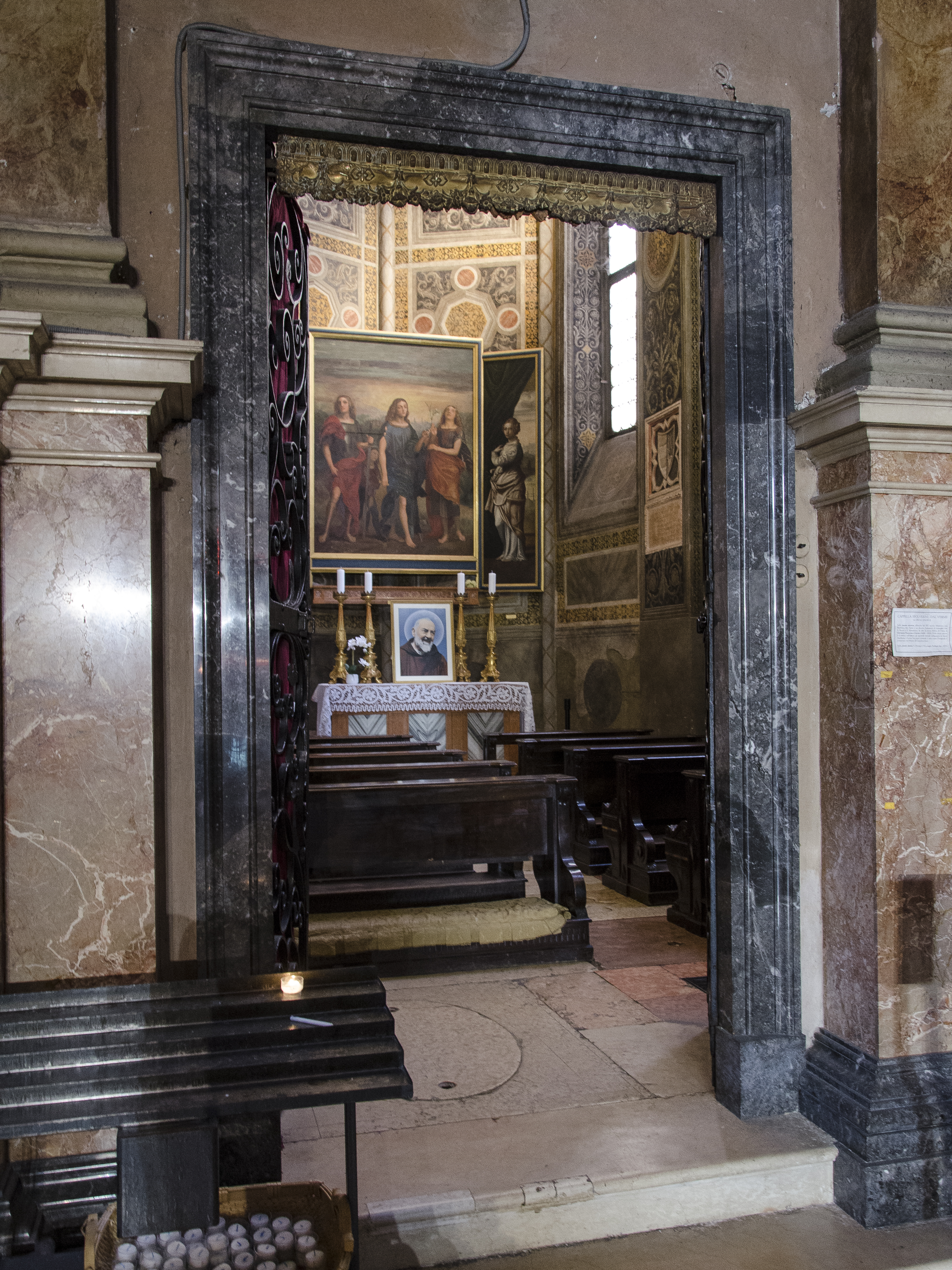 Chiesa di Sant'Eufemia - cappella Spolverini Dal Verme